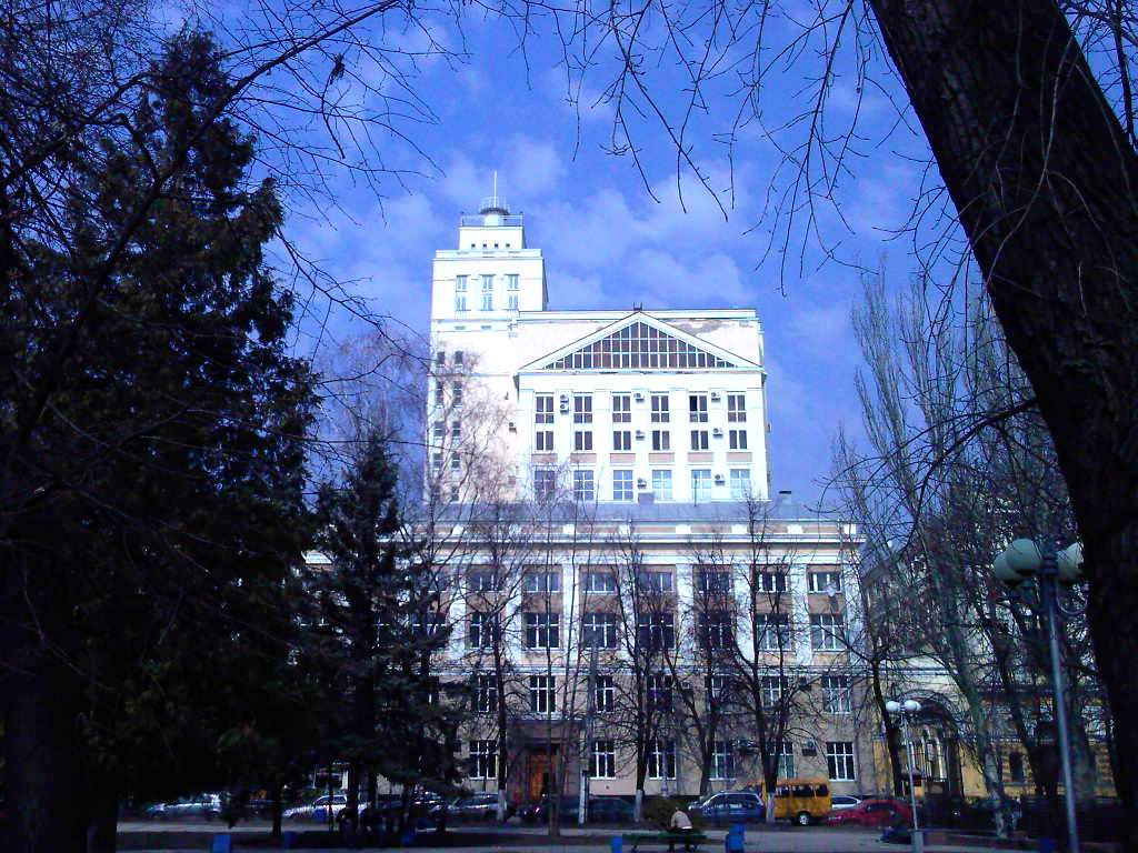 Здание юридического факультета ВГУ